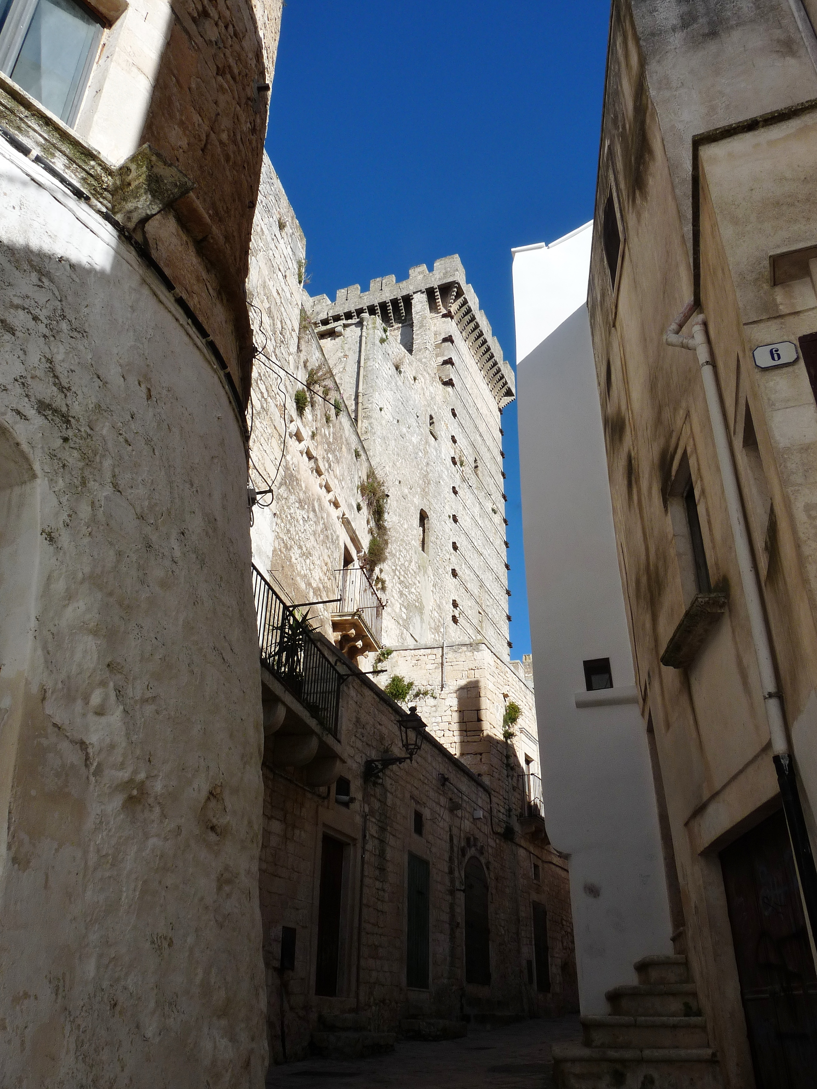 La Torre Quadrata alta 34 m fotografata da Via Pietro Elia